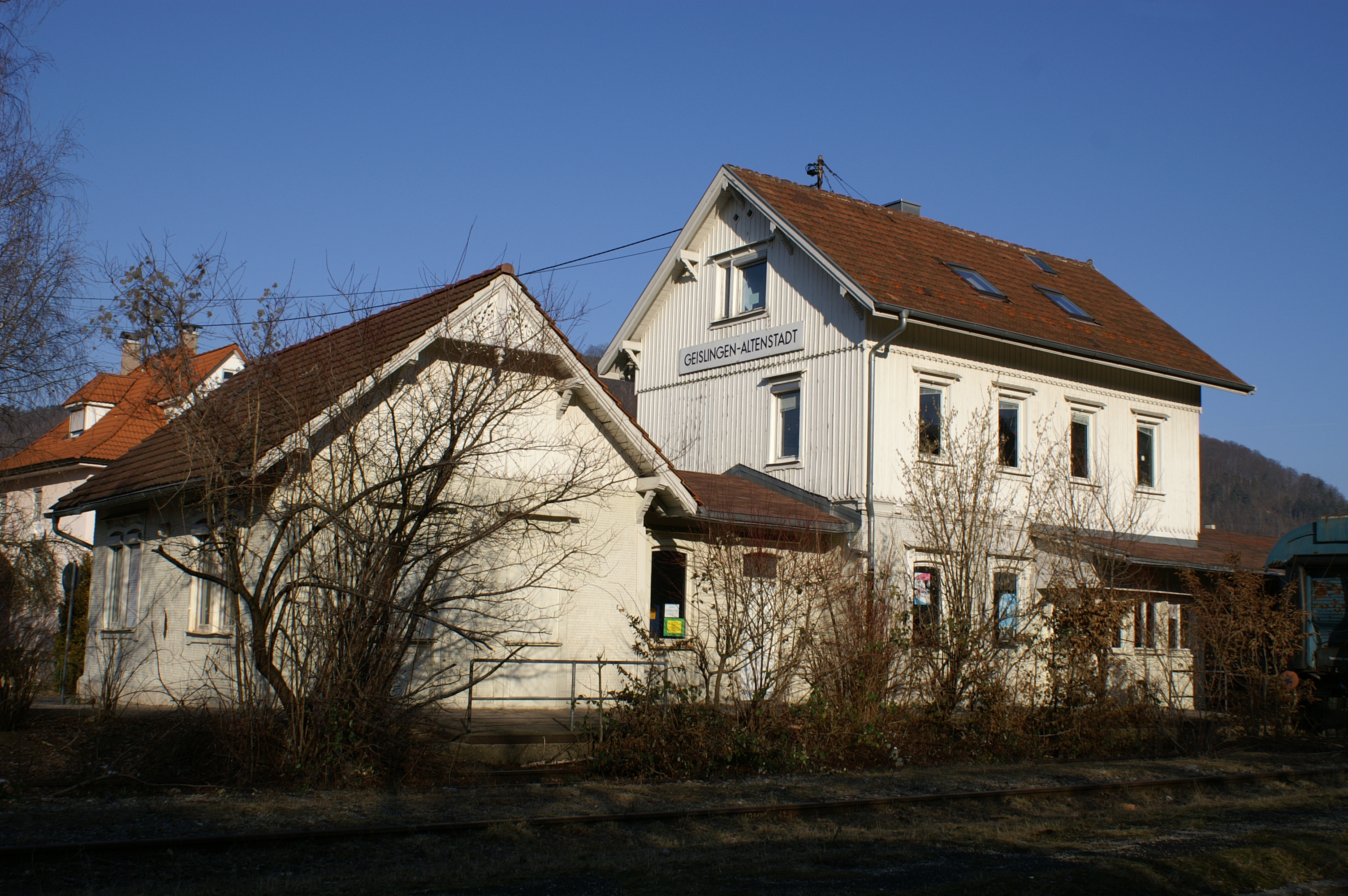 Im ehemaligen Tälesbahnhof Geislingen-Altenstadt ist heute ein Jugendhaus untergebracht